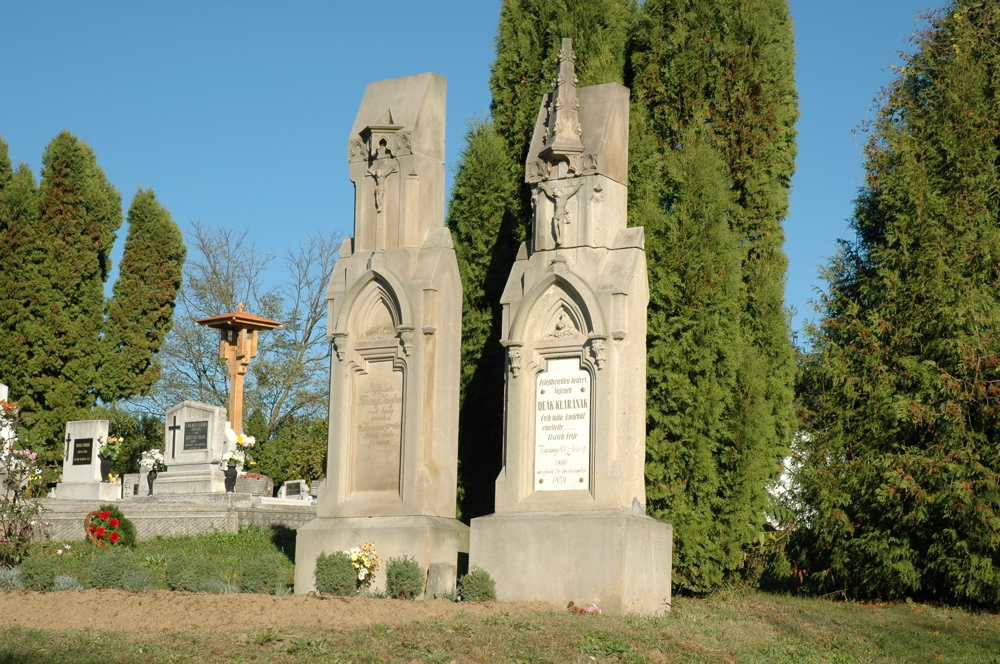 Grave of Deák Klára and Tarányi (Oszterhueber) József (Pusztaszentlászló, Zala county, Hungary)